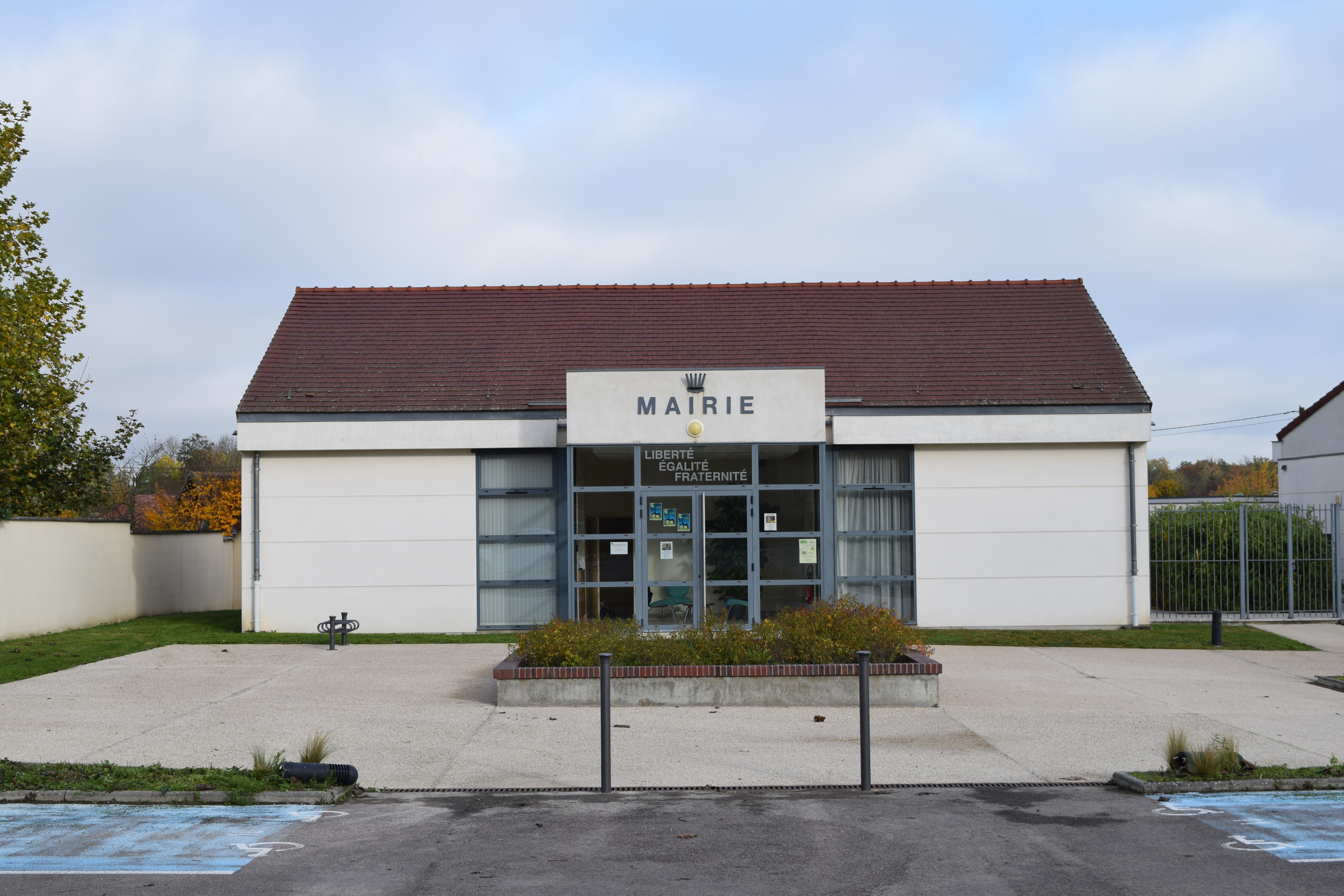 Mairie de Rouilly-Saint-Loup